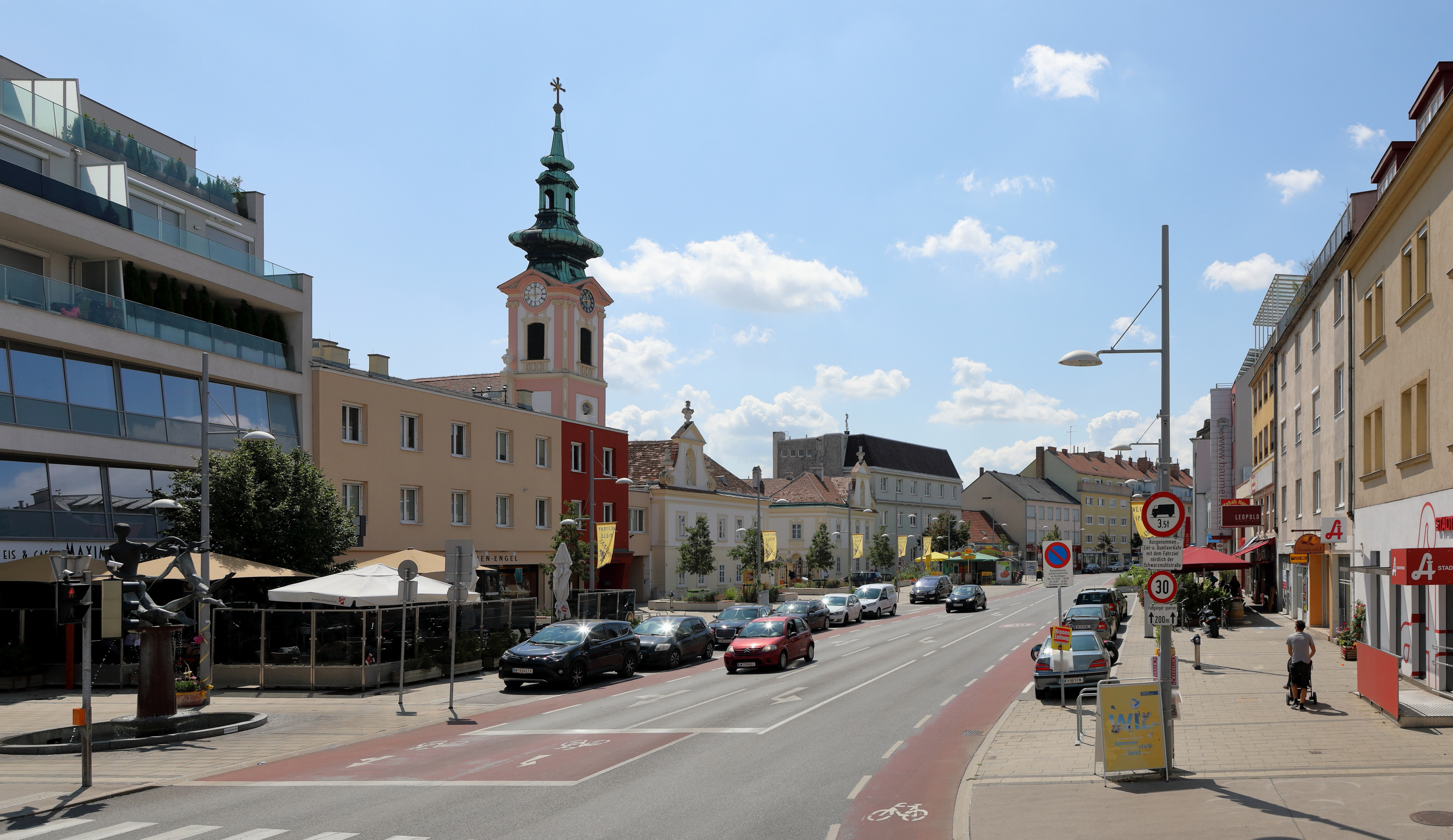 Nordansicht des Hauptplatzes der niederösterreichischen Stadt Schwechat.